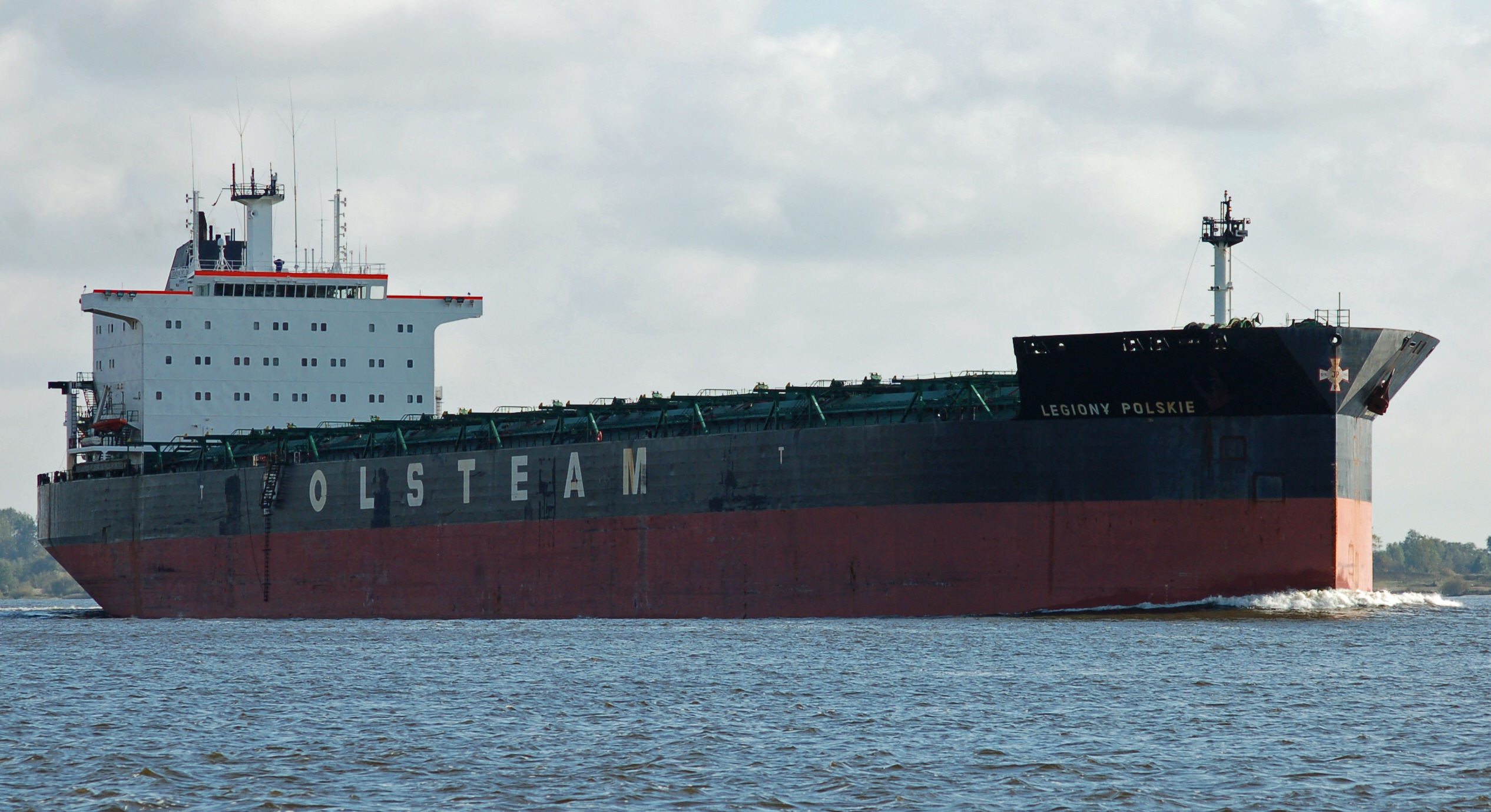 Das Frachtschiff Legiony_Polskie auf der Elbe bei Wedel IMO-Nummer: 8919611 MMSI-Nummer: 576062000 Rufzeichen: YJZJ5 Länge: 229.0m Breite: 32.0m Flagge: Vanuatu